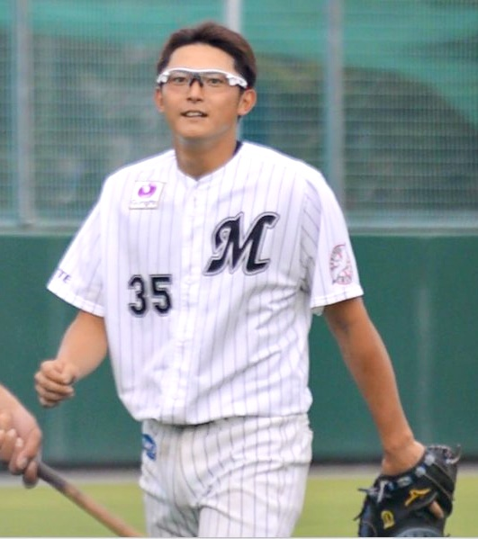 寺嶋寛大選手